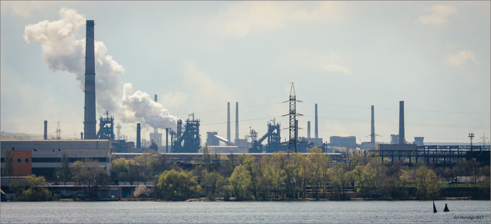 вид на ДМЗ